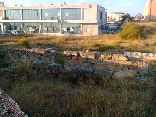 Αρχαίο θέατρο Ευωνύμου 003